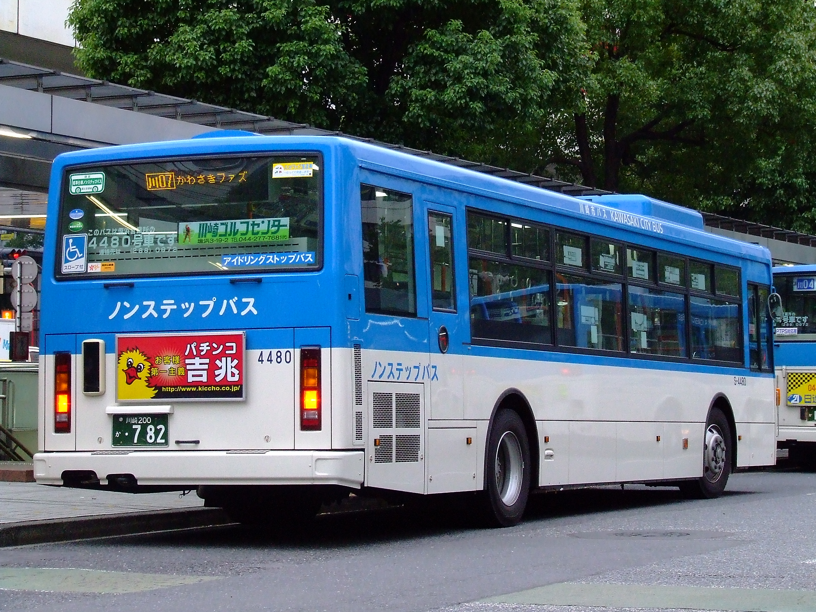 川崎市バス 塩浜営業所S4480号車後部 PKG-RA274PAN